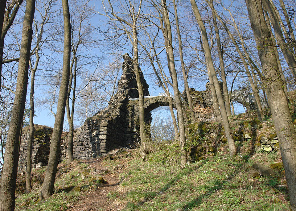 Hrad Himmelstein, vrch Nebesa, Osvinov.